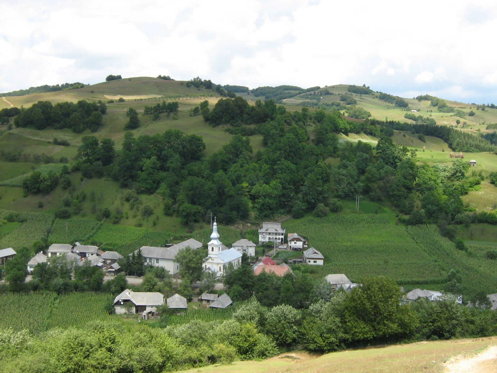 Vedere-Centrul satului Agries